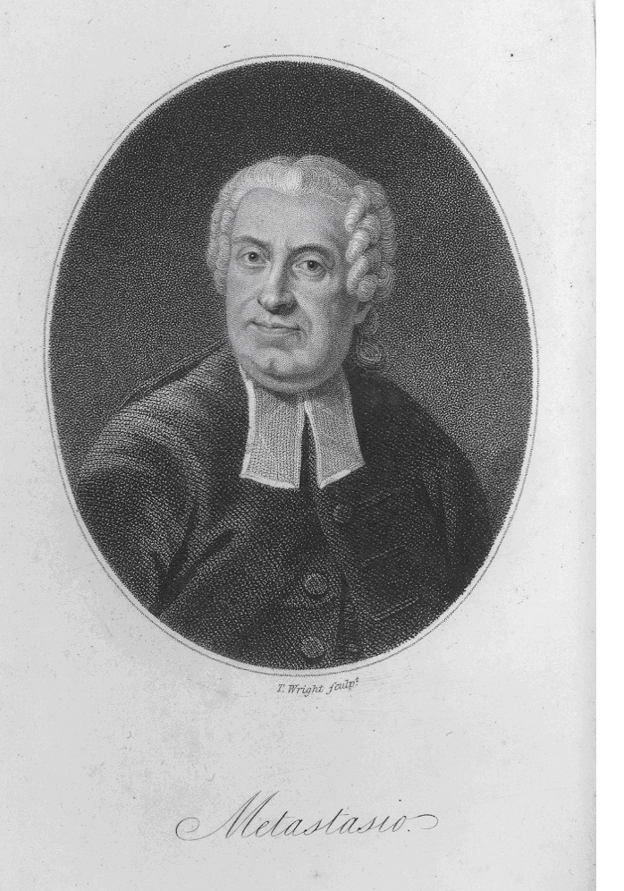 Pietro Metastasio, grabado de Johann Nepomuk Steiner (1725 – 1793)